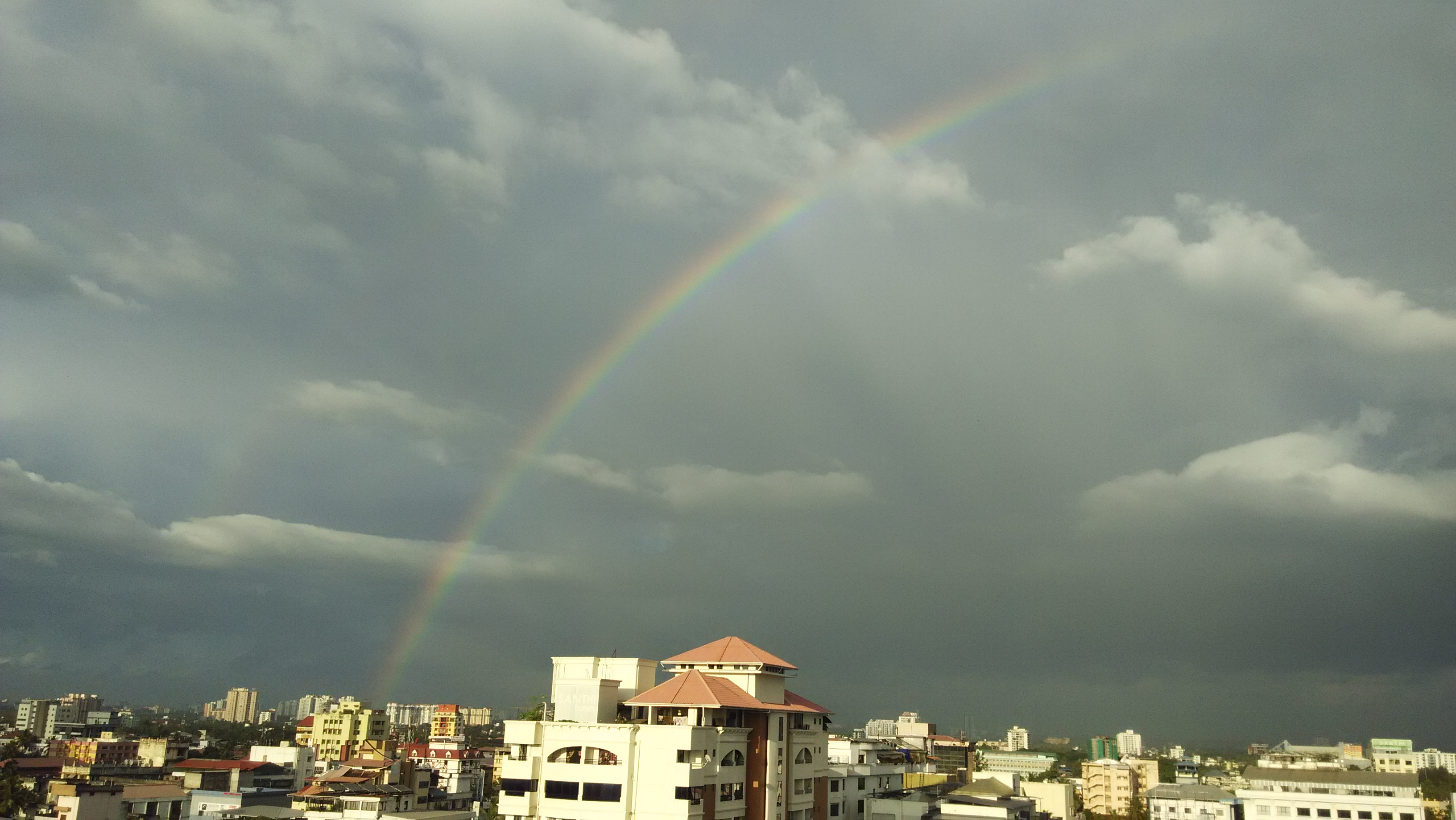 ഉയരത്തില്‍നിന്നും കൊച്ചിയുടെ കാഴ്ച.